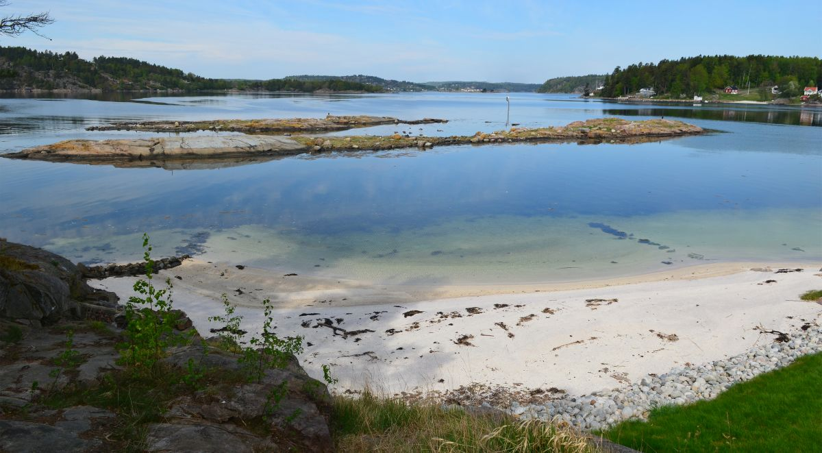 Saltbuskjær ligger helt vest i Vrengensundet.